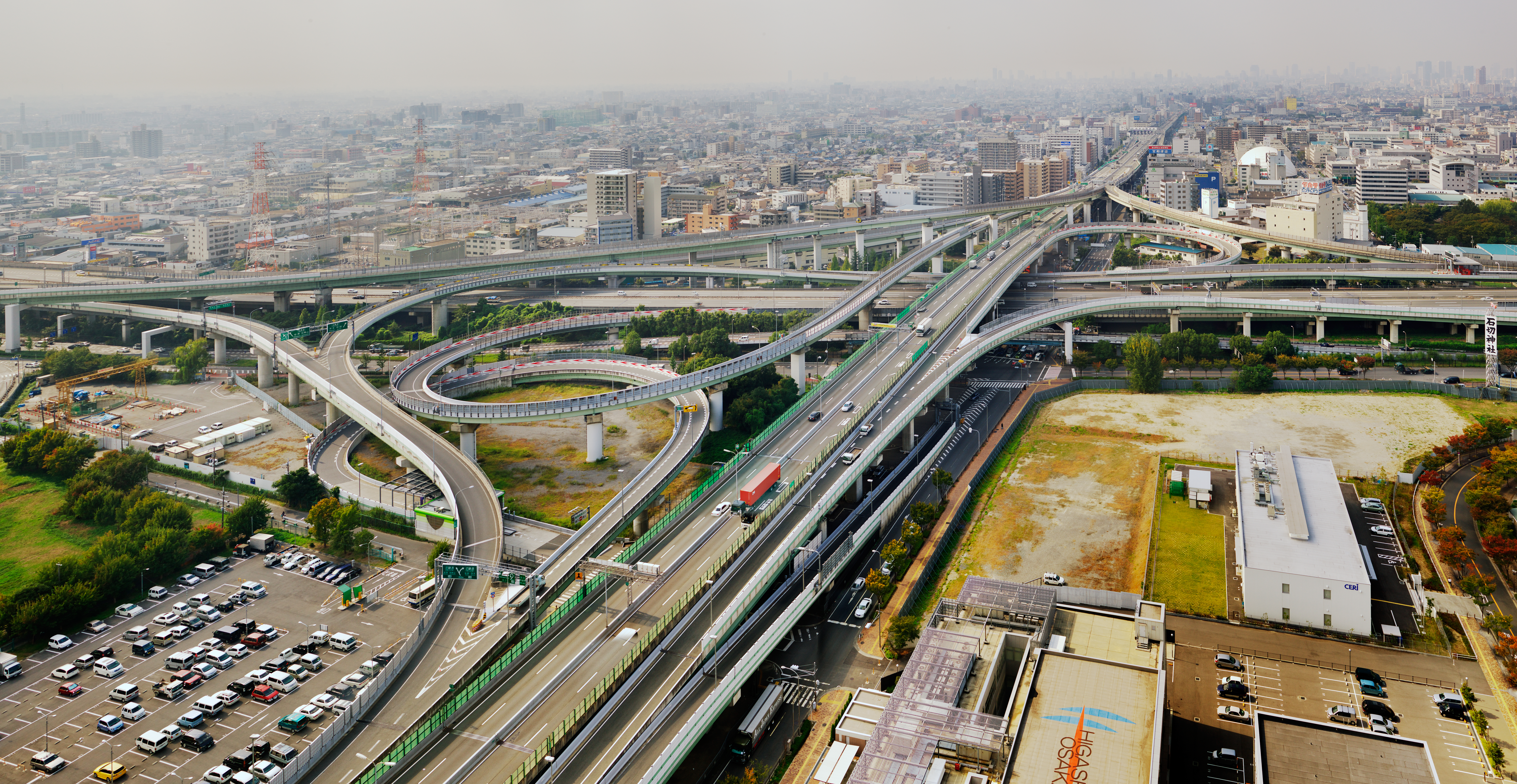 東大阪ジャンクション。